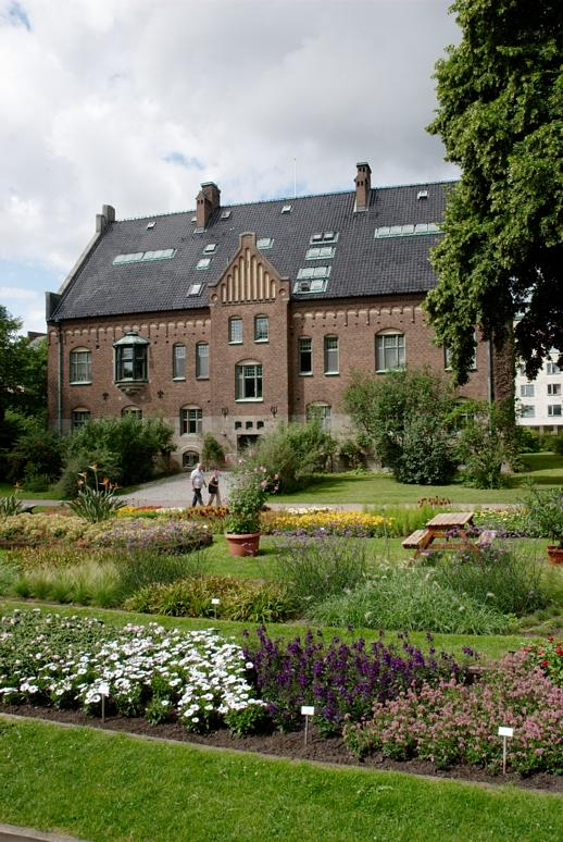 Museibyggnad. Trädgården anlades under 1860-talet under ledning av J G Agardh, på denna mark som redan tillhörde universitetet. Motiv: Botaniska trädgården i Lund Nyckelord: Byggnadsminnen:Statl Kategori: Botanisk trädgård, Museum Museibyggnad. Trädgården anlades under 1860-talet under ledning av J G Agardh, på denna mark som redan tillhörde universitetet.